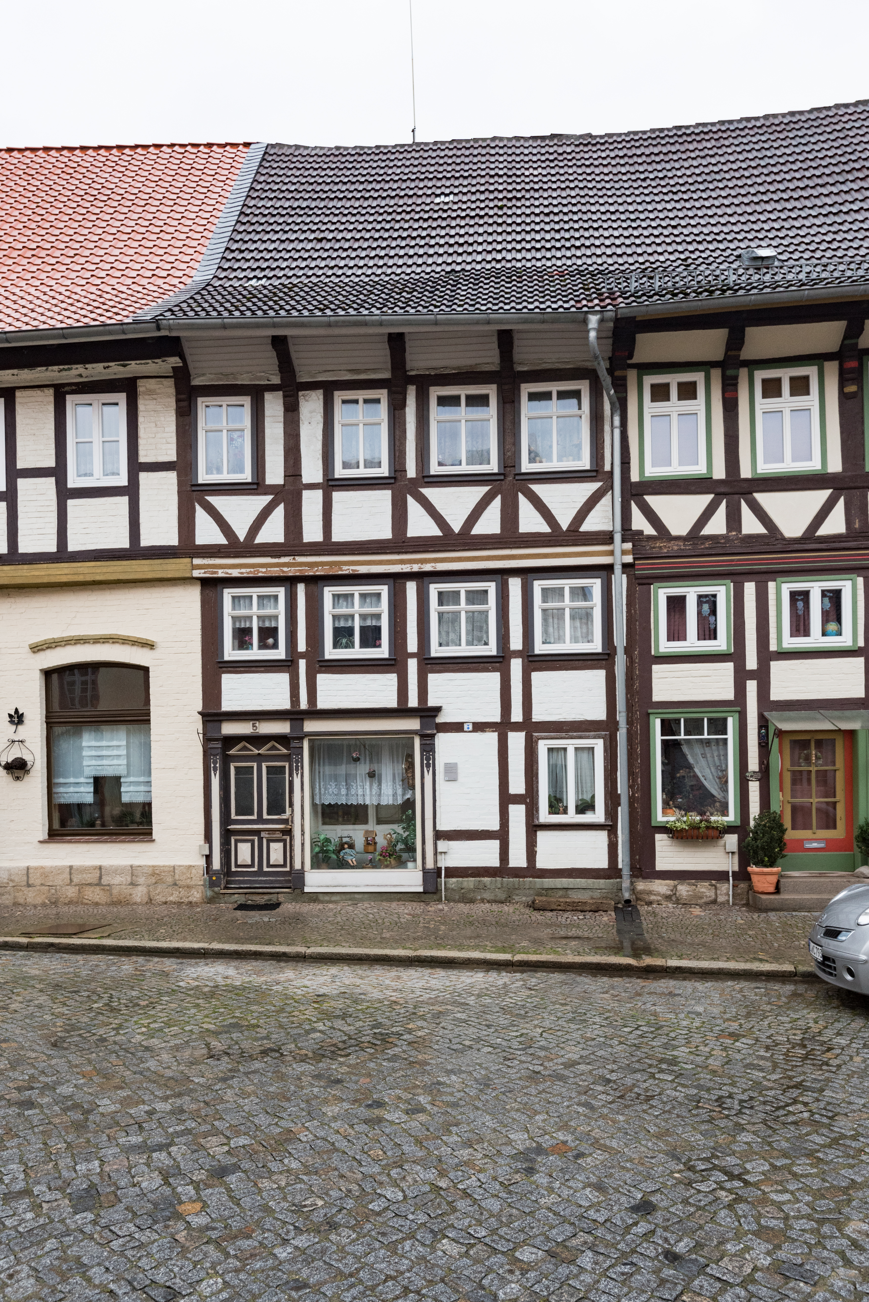 Osterwieck, Am Markt 5